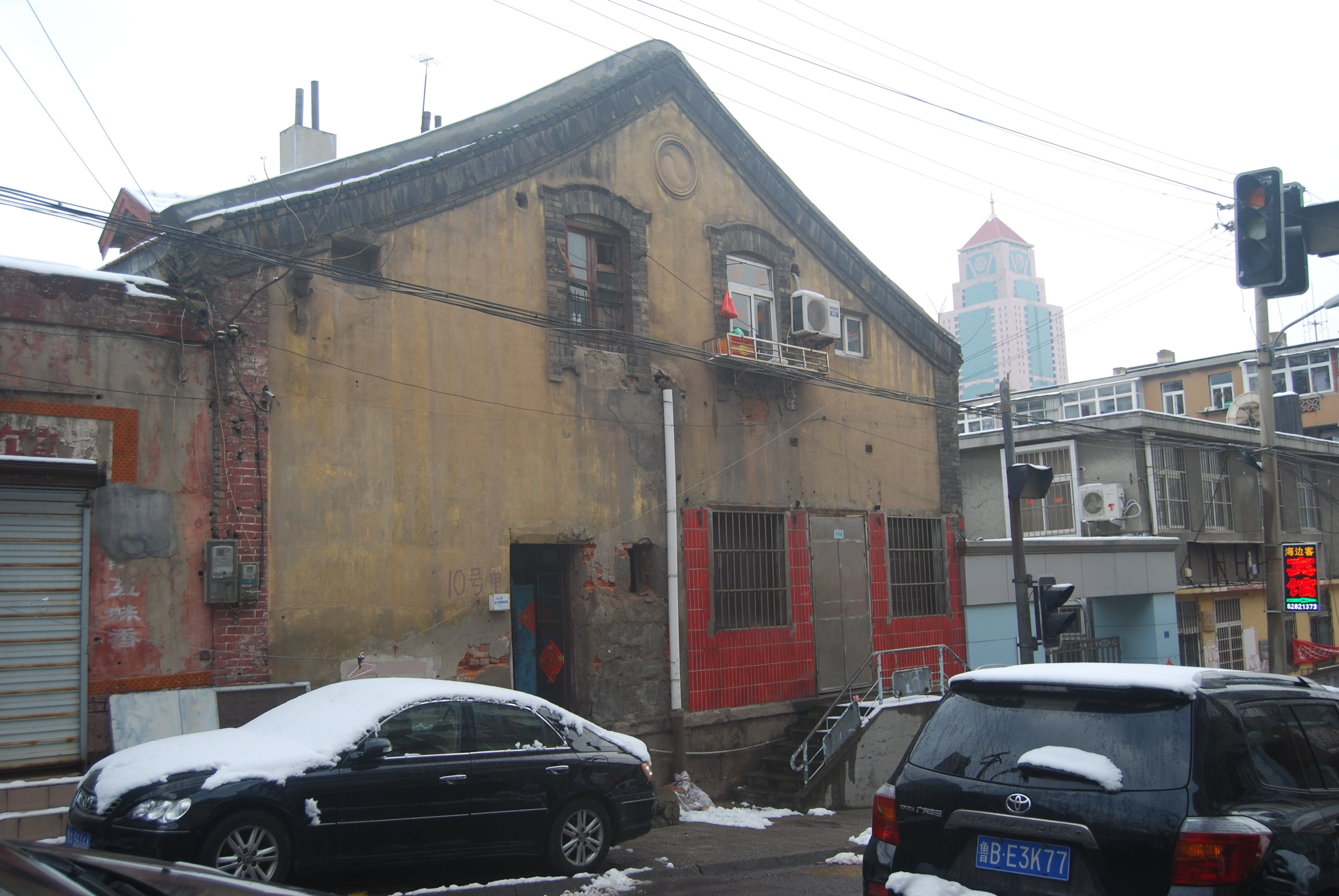 青岛三江会馆旧址